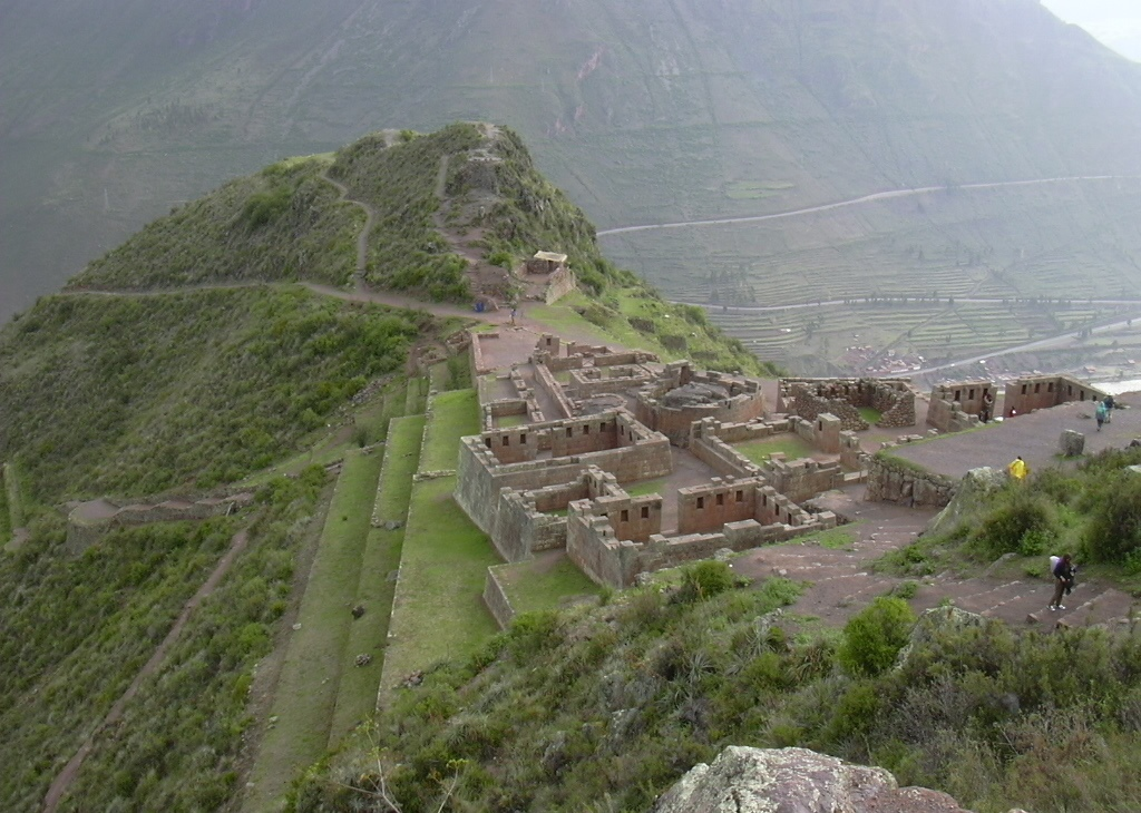 Machu Picchu